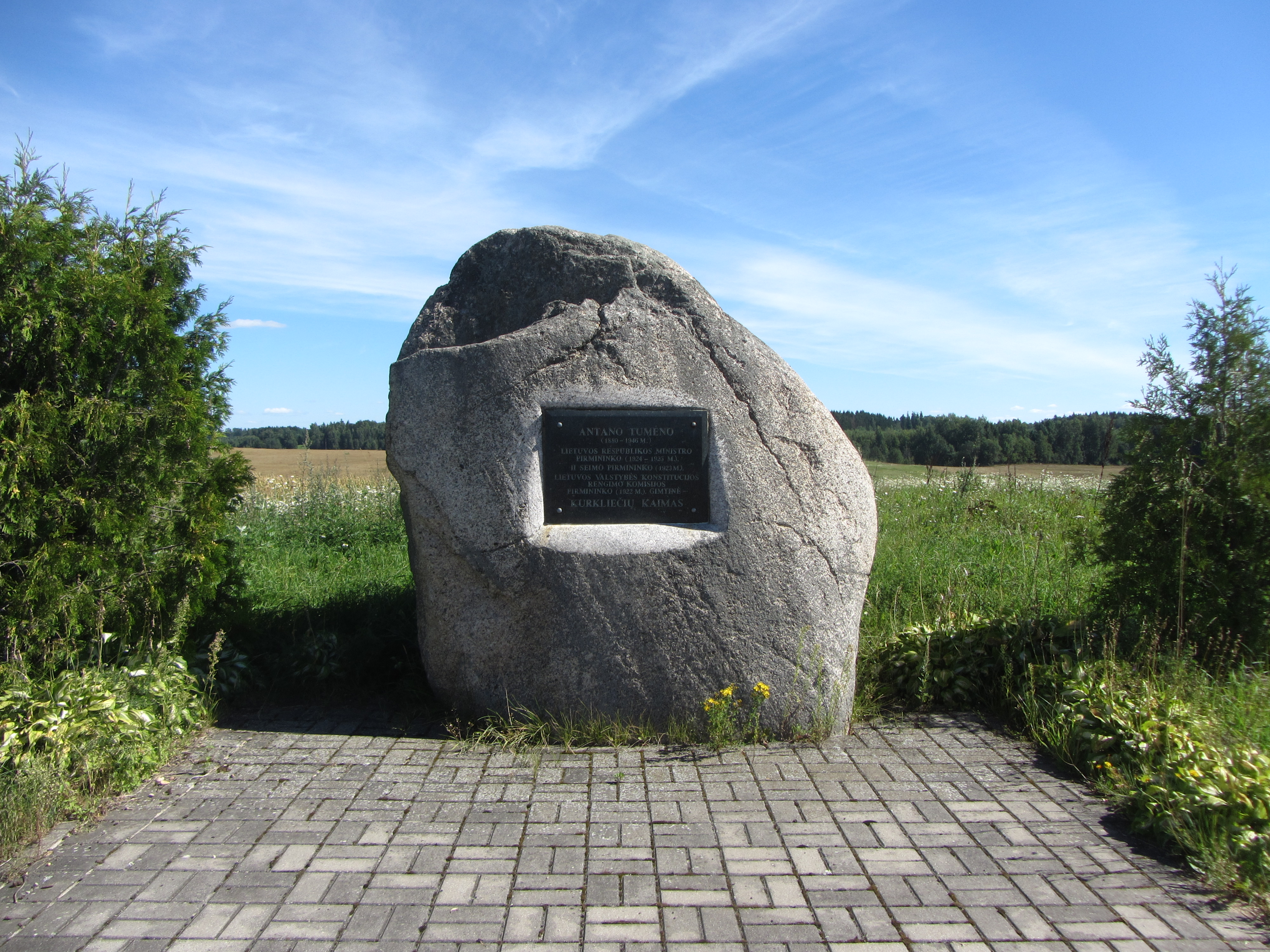 Antanas Tumėnas birthplace, Jūžintų sen., Lithuania